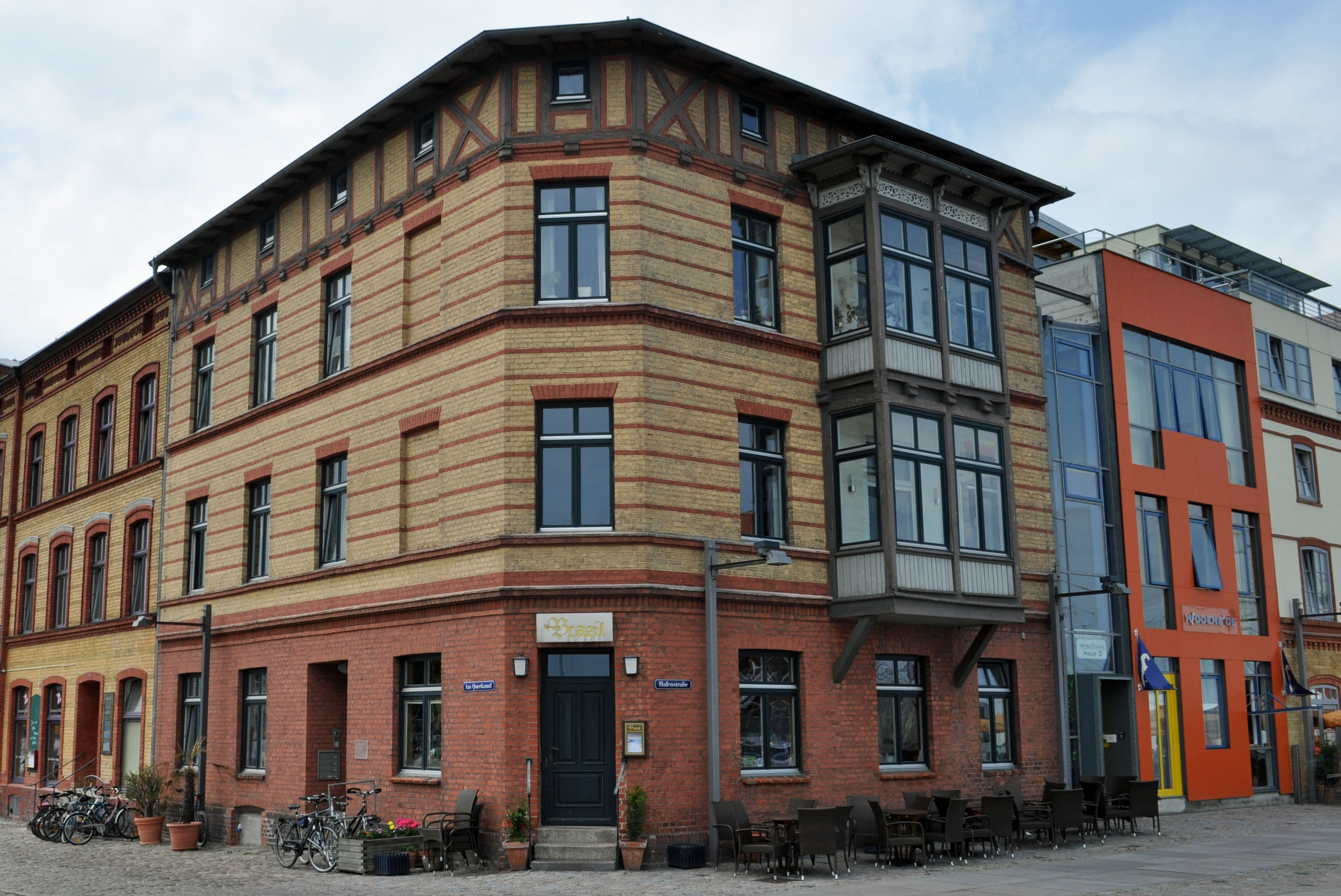 Im Tierpark Stralsund (see Tierpark Stralsund.